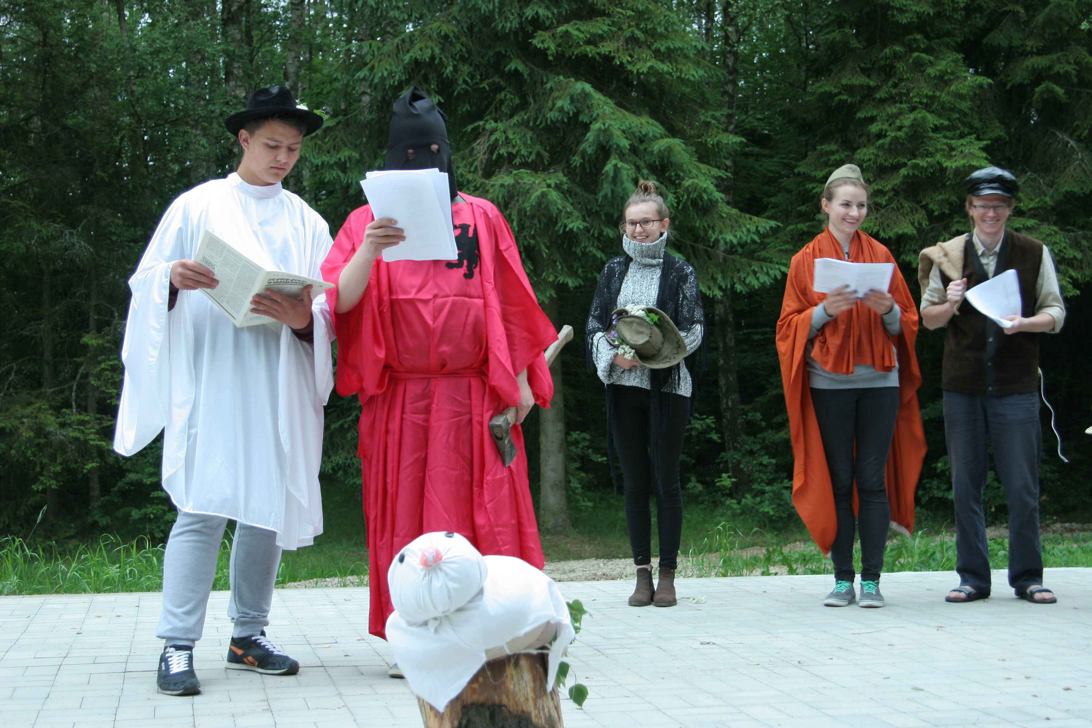 Uczestnicy obrzędu ścinania kani